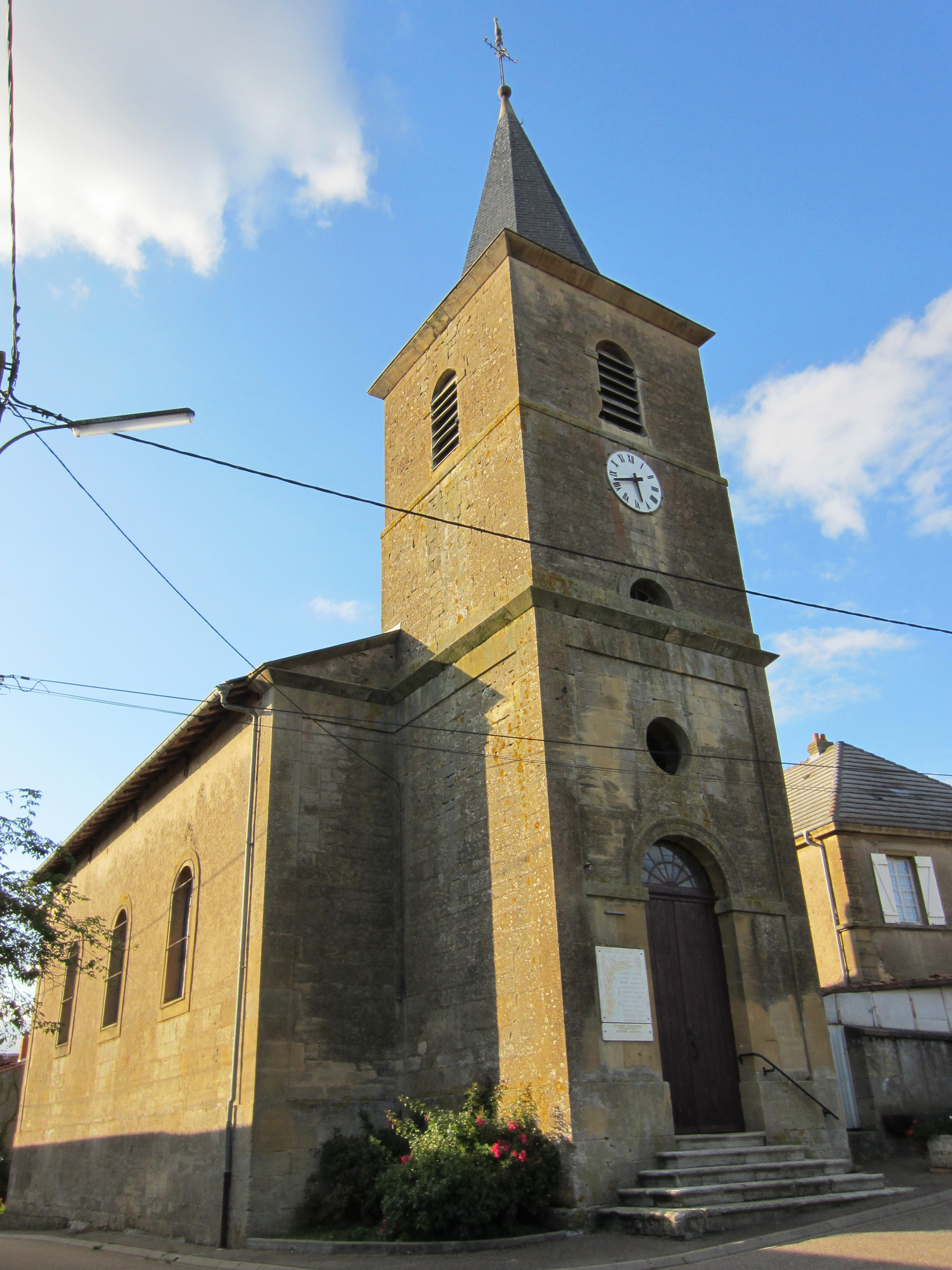 Description eglise Lixieres eglise Lixieres